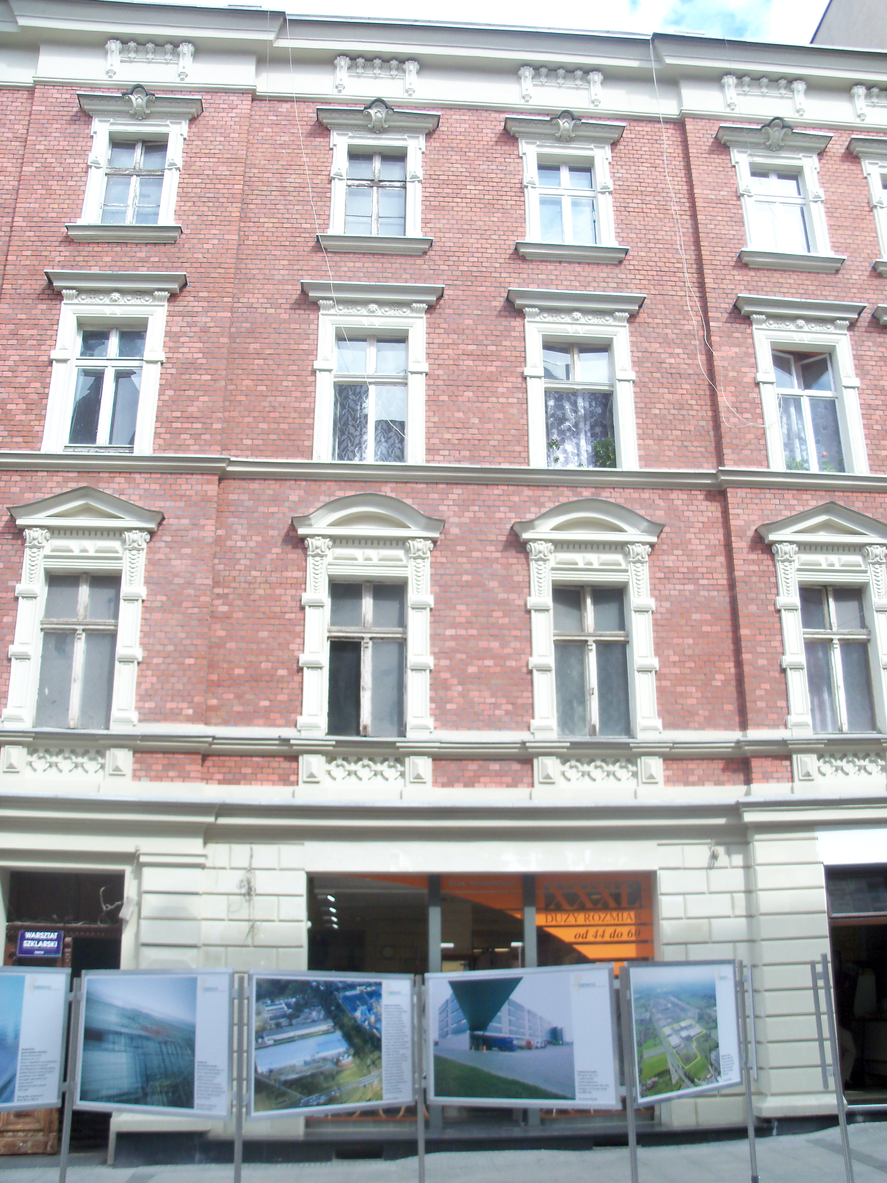 Katowice, ul. A. Mielęckiego 8 - kamienica